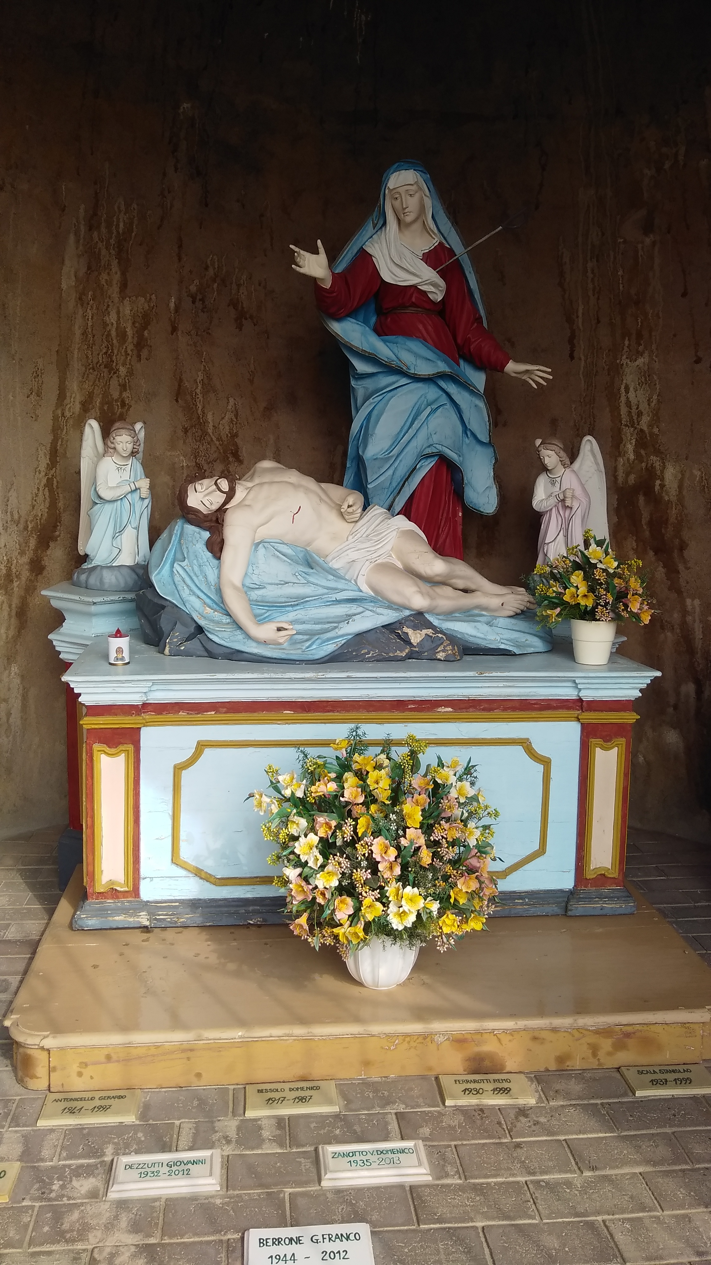 Cuceglio (TO) santuario dalla Beata Vergine Addolorata